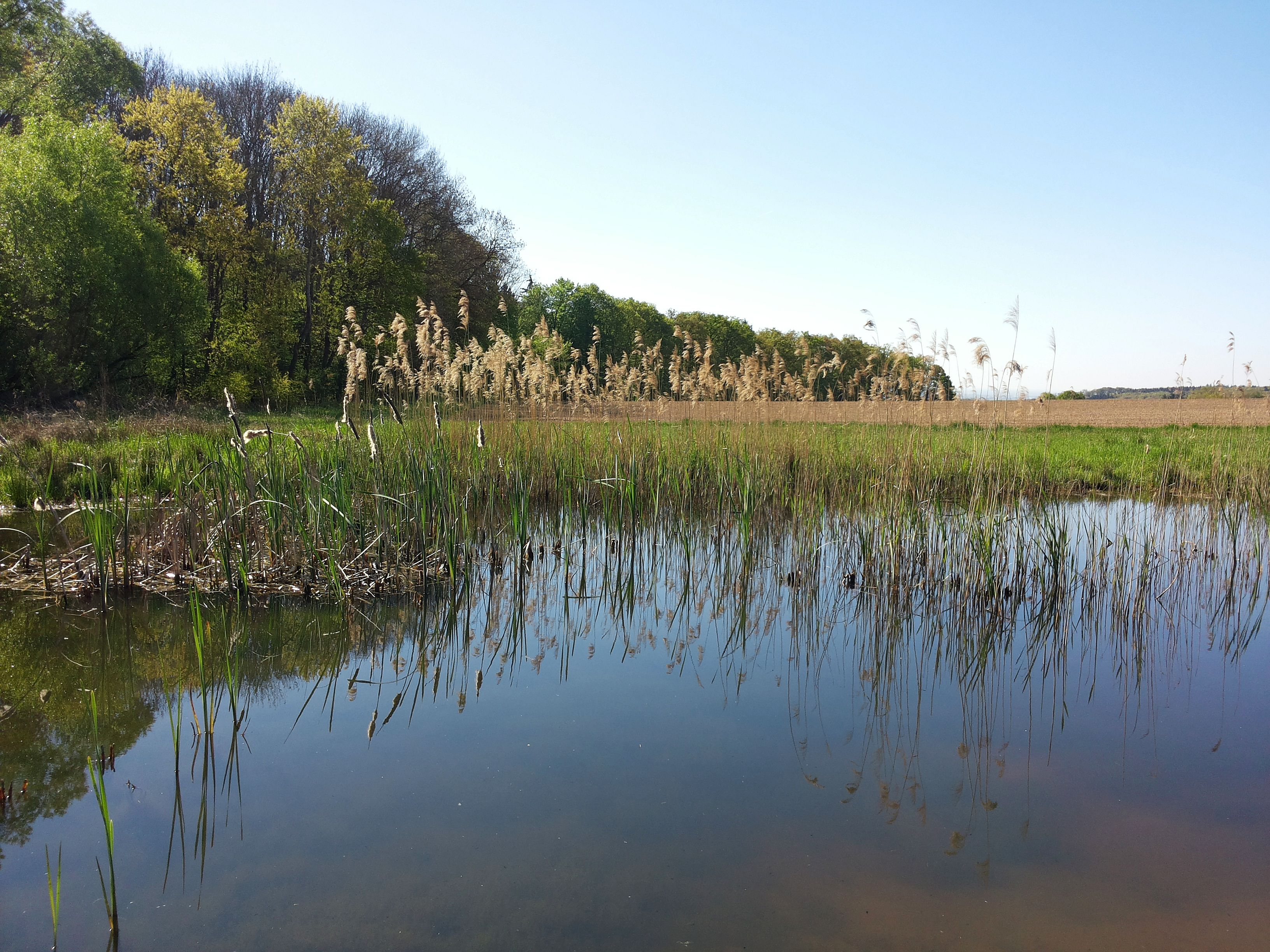 Tümpel am Waldesrand mit Schilfrohr